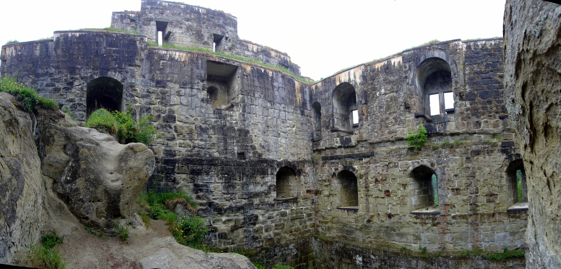 Grasburg innen